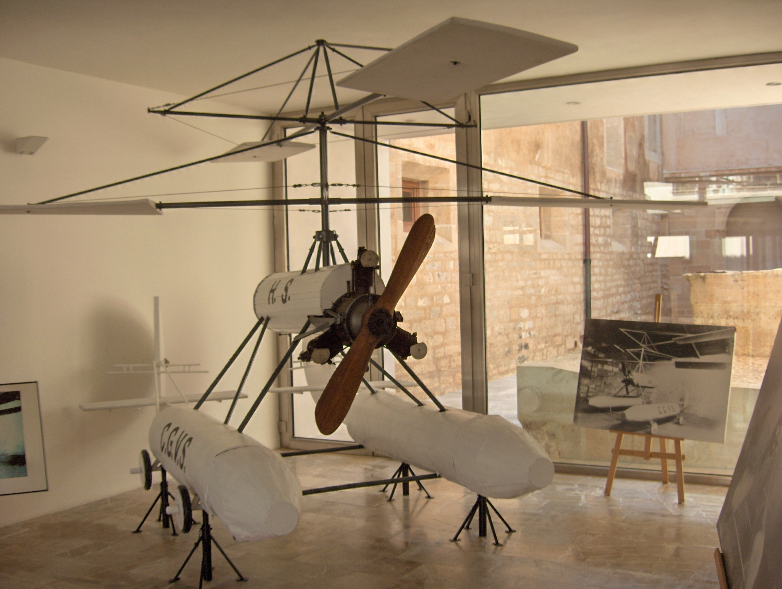 Cometagiroavió d'en Pere de Son Gall (restaurat)